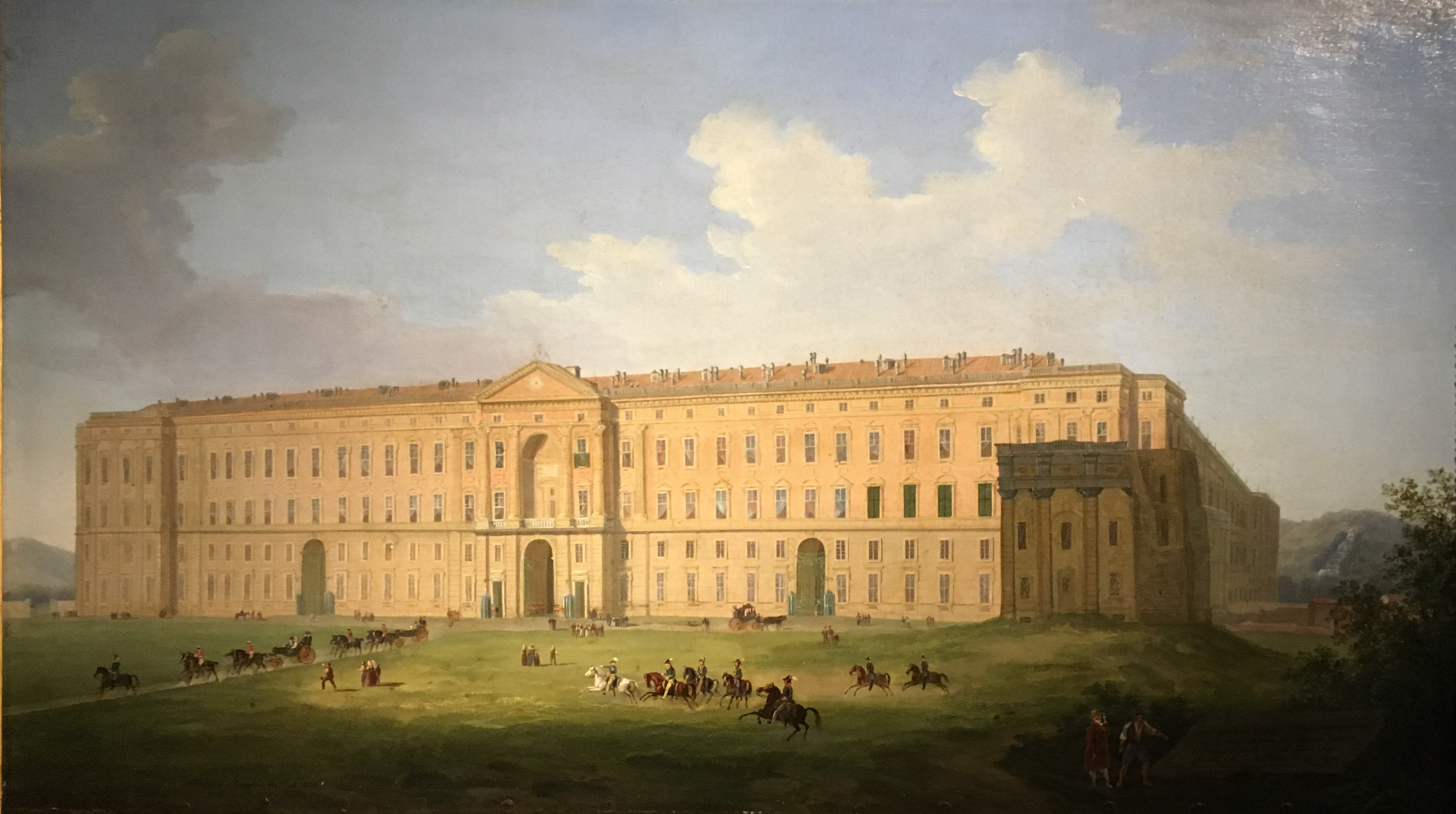 Facciata principale della Reggia di Caserta